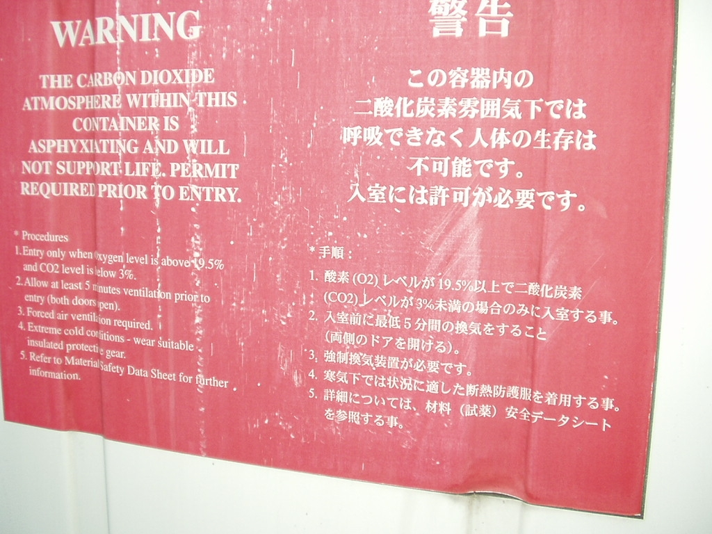 日本向けの冷凍マグロ輸送専用、保温コンテナ ( タイプコード、H5 を付与 ) 。 入り口反対側の妻壁側下部にある丸型アダプターに、外部 (タンクローリー等) からホースを繋ぎ、二酸化炭素ガスを注入する。 これにより、冷凍機のない保温コンテナが、-50℃の超低温冷凍状態になる。 尚、注入したガス圧力は、同じ妻壁上部にある銀色の通風孔より抜ける。 【 2005.08.05 静岡県／清水港袖師第一埠頭にて、撮影】